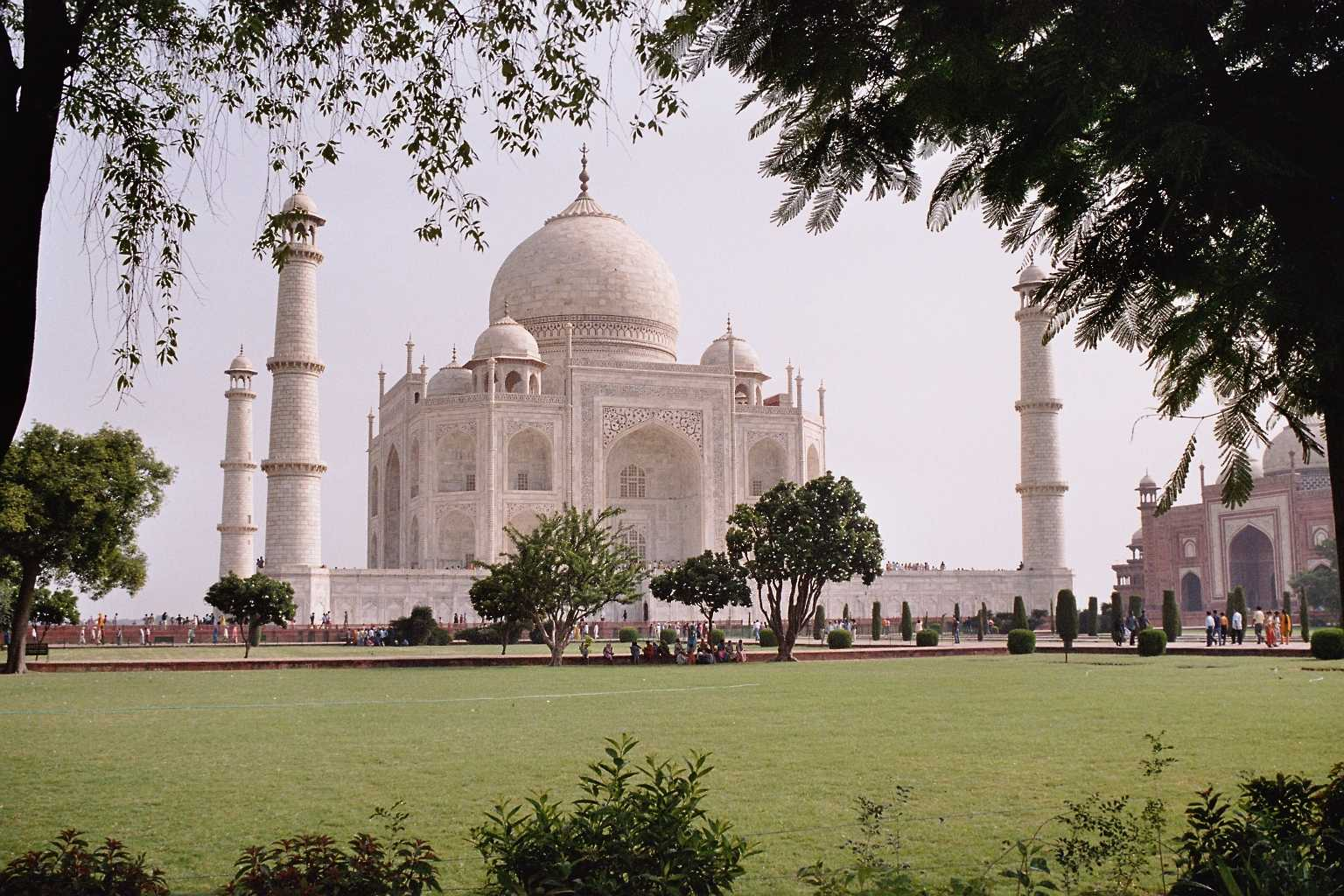 Taj Mahal in Agra, India. Picture take by Núria Pueyo, august 2005.